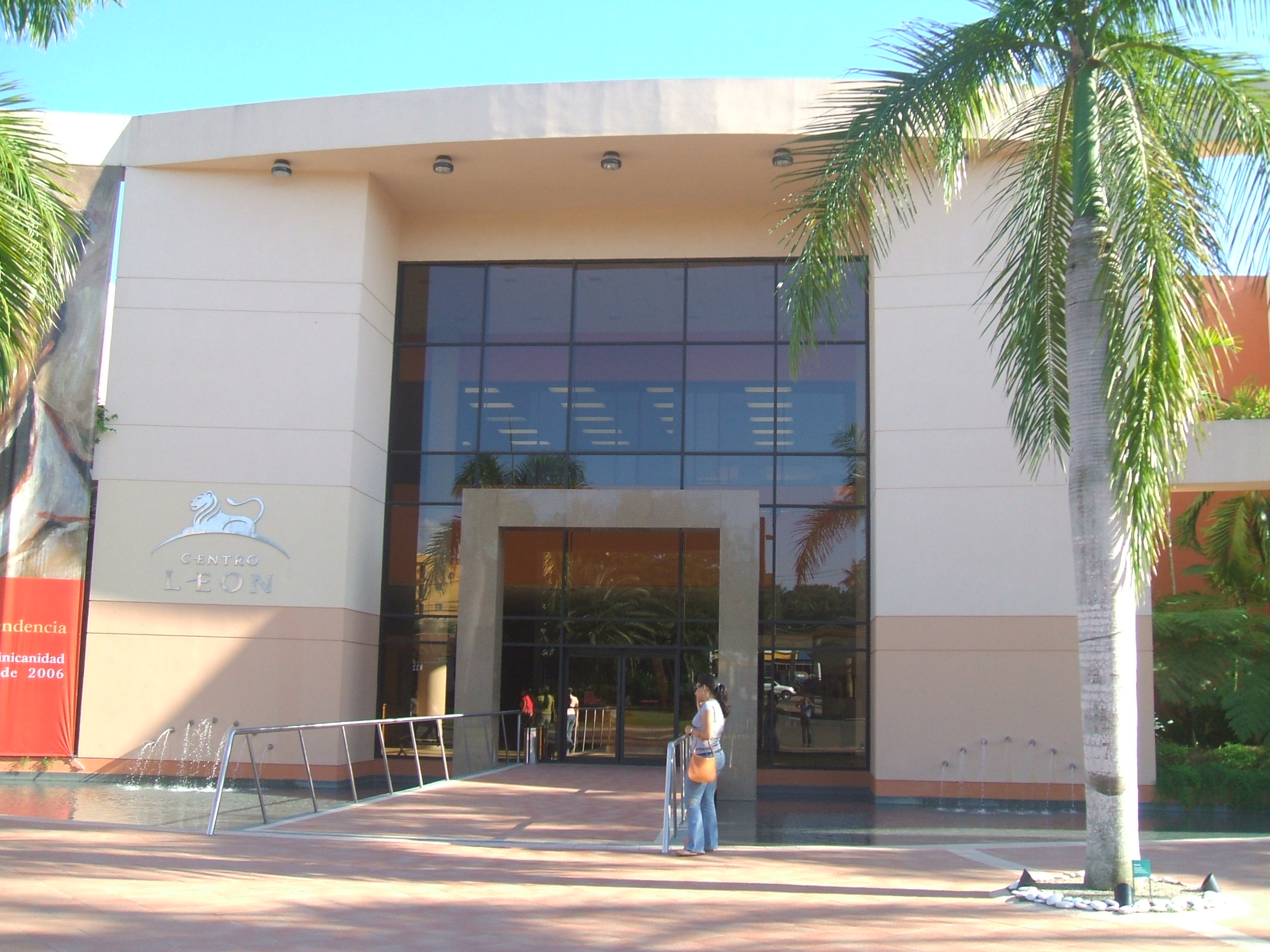 Fachada frontal del Centro León en Santiago, República Dominicana.